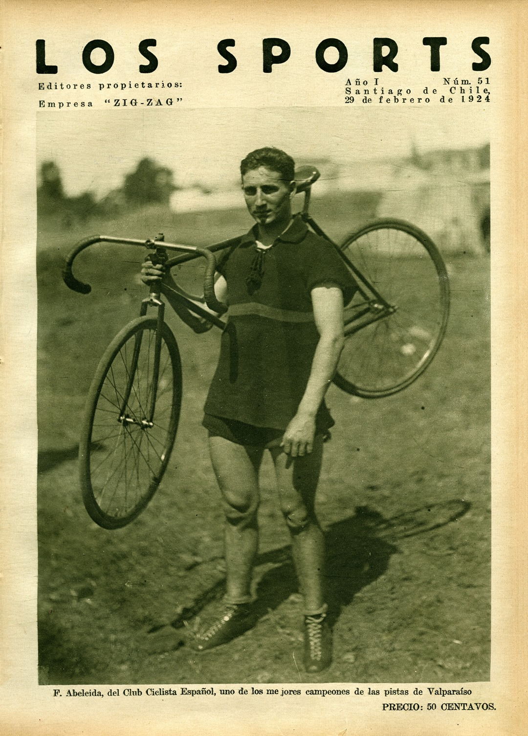 Los Sports, número 51, 29 de febrero de 1924